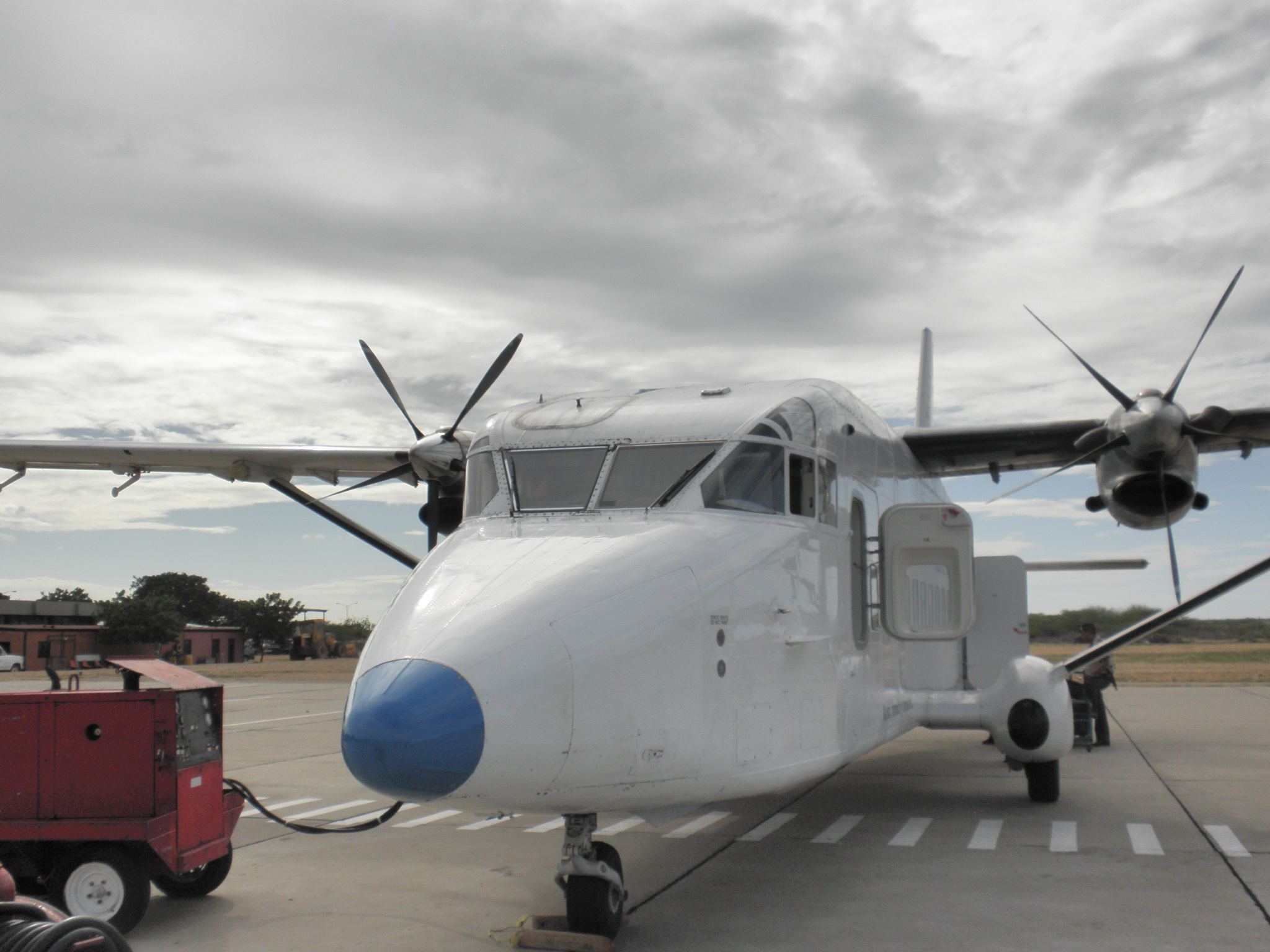 Avión de Tiara Air cargando combustible en el aeropuerto de Punto Fijo (Venezuela), para volar a Aruba.